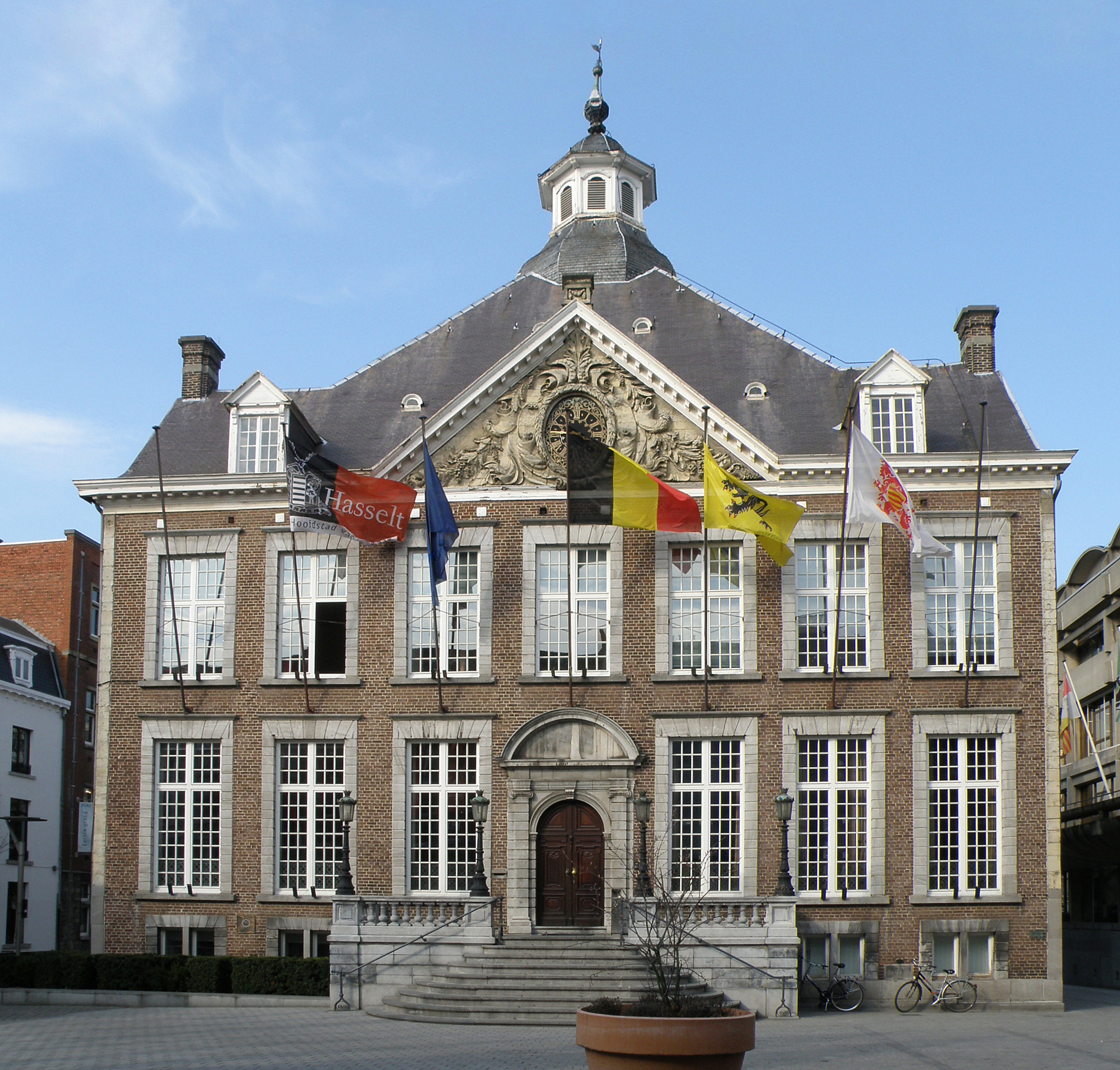 Hasselt (prov. Limburg, België). Stadhuis, Groenplein. Derde kwart 17de eeuw, volledig aangepast anno 1780 in laatclassicistische stijl.